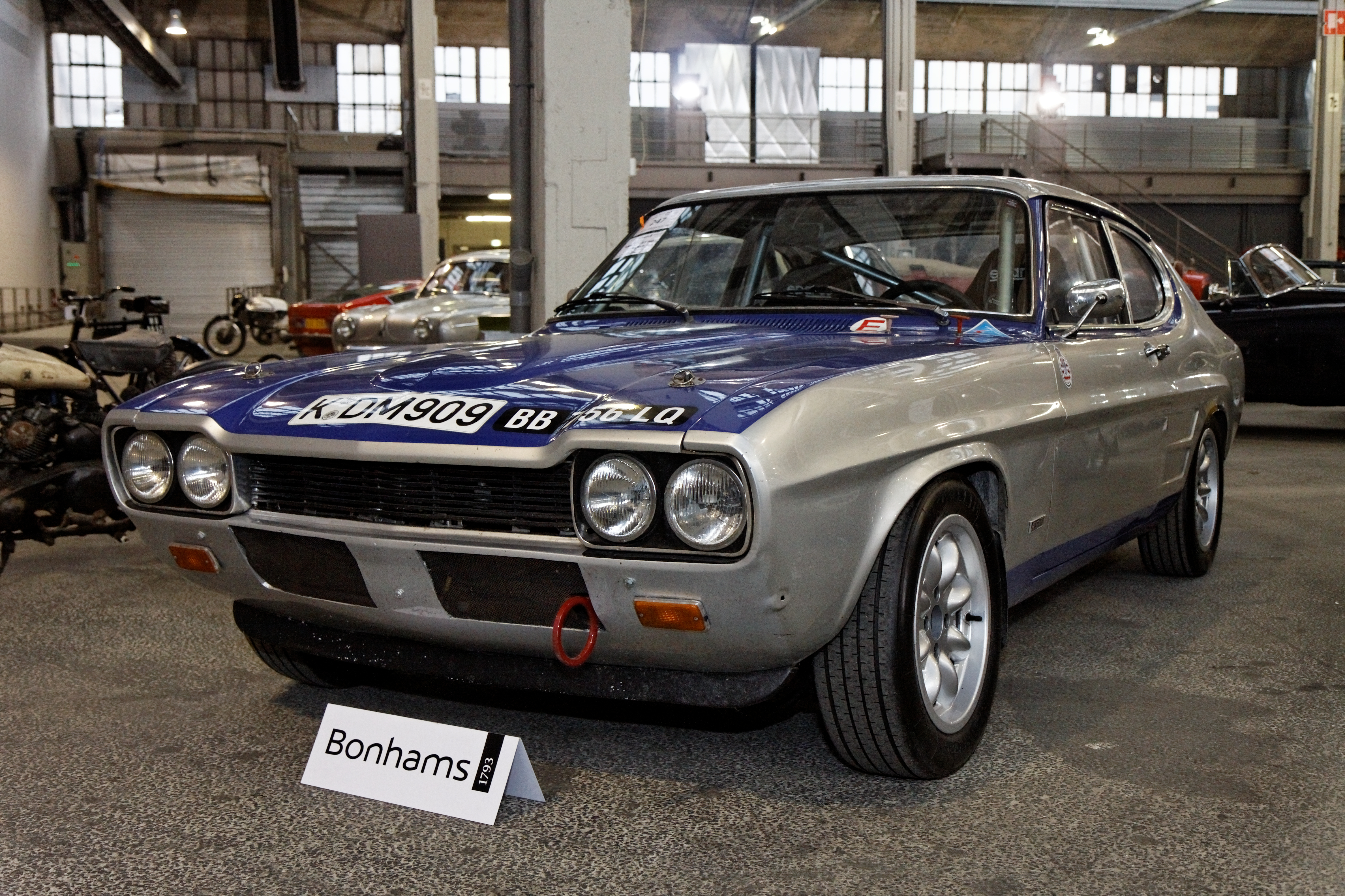 Ford Capri RS2600 Coupé 'plastique' usine